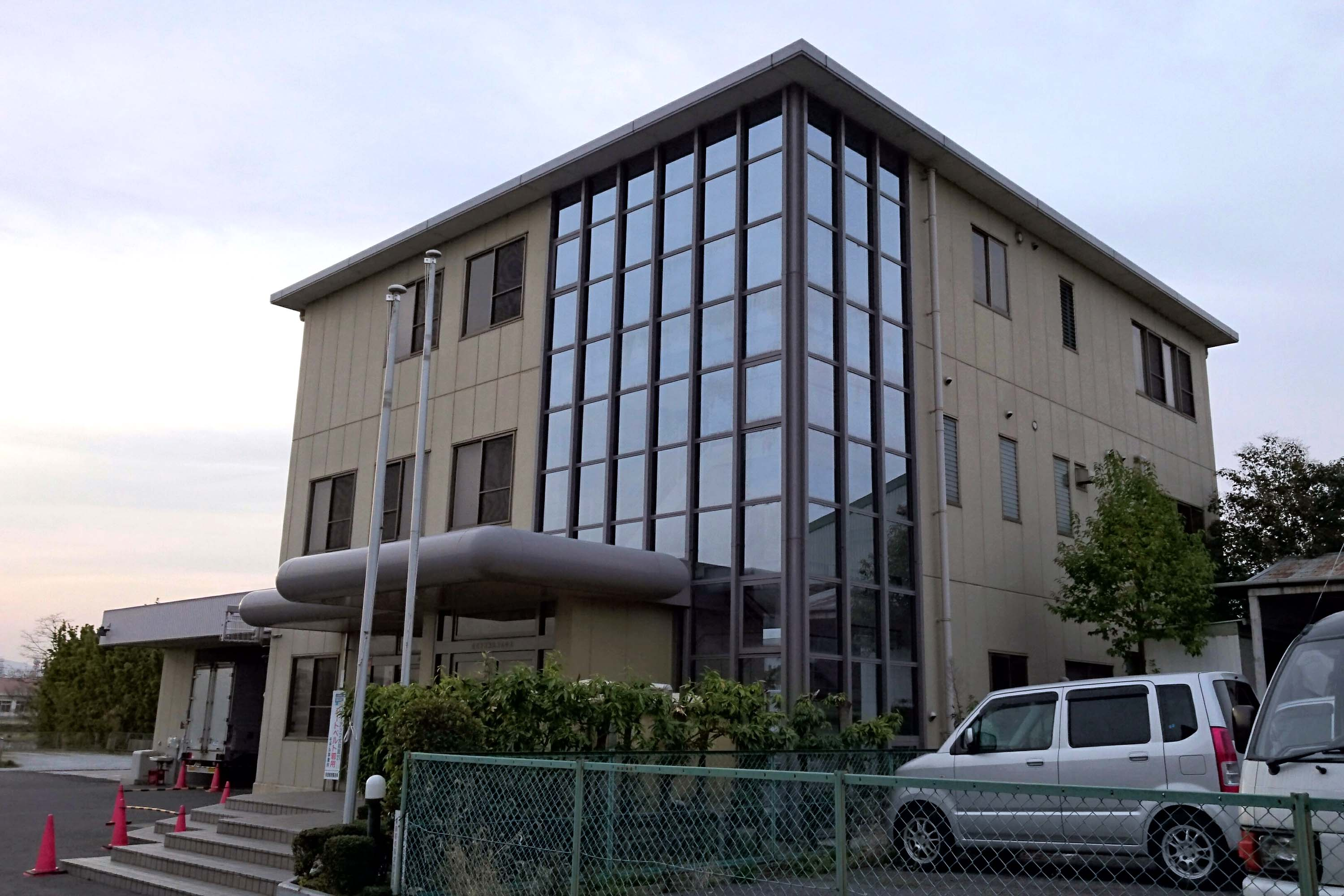 奈良郵便輸送株式会社の本社社屋です。